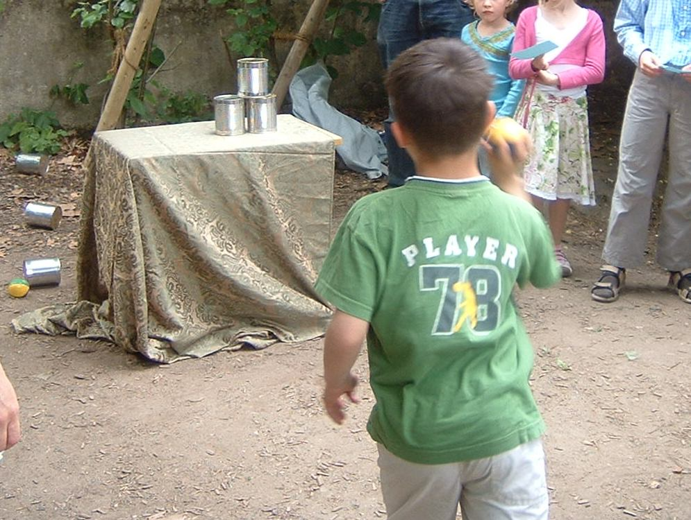 Kind beim Dosenwerfen auf einem Schulfest in Frankfurt